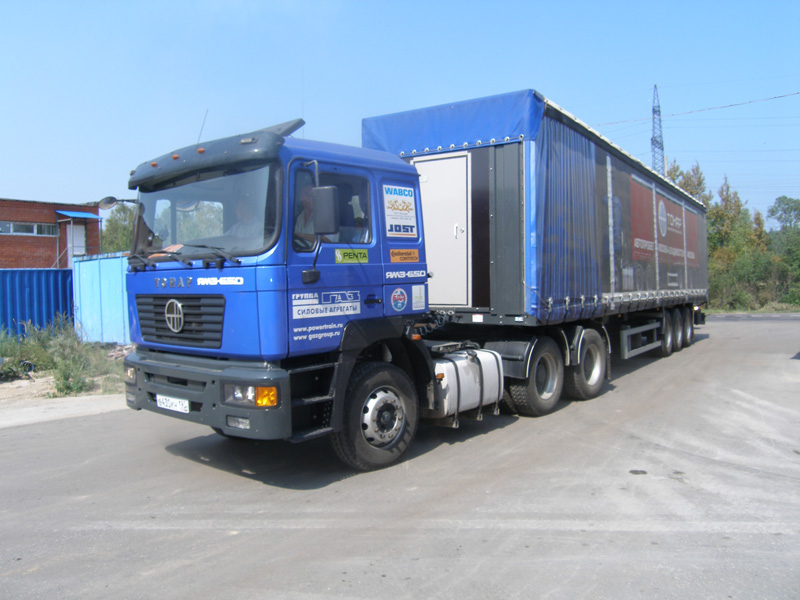 Седельный тягач Тонар-6428 въезжает на завод летом 2010 года